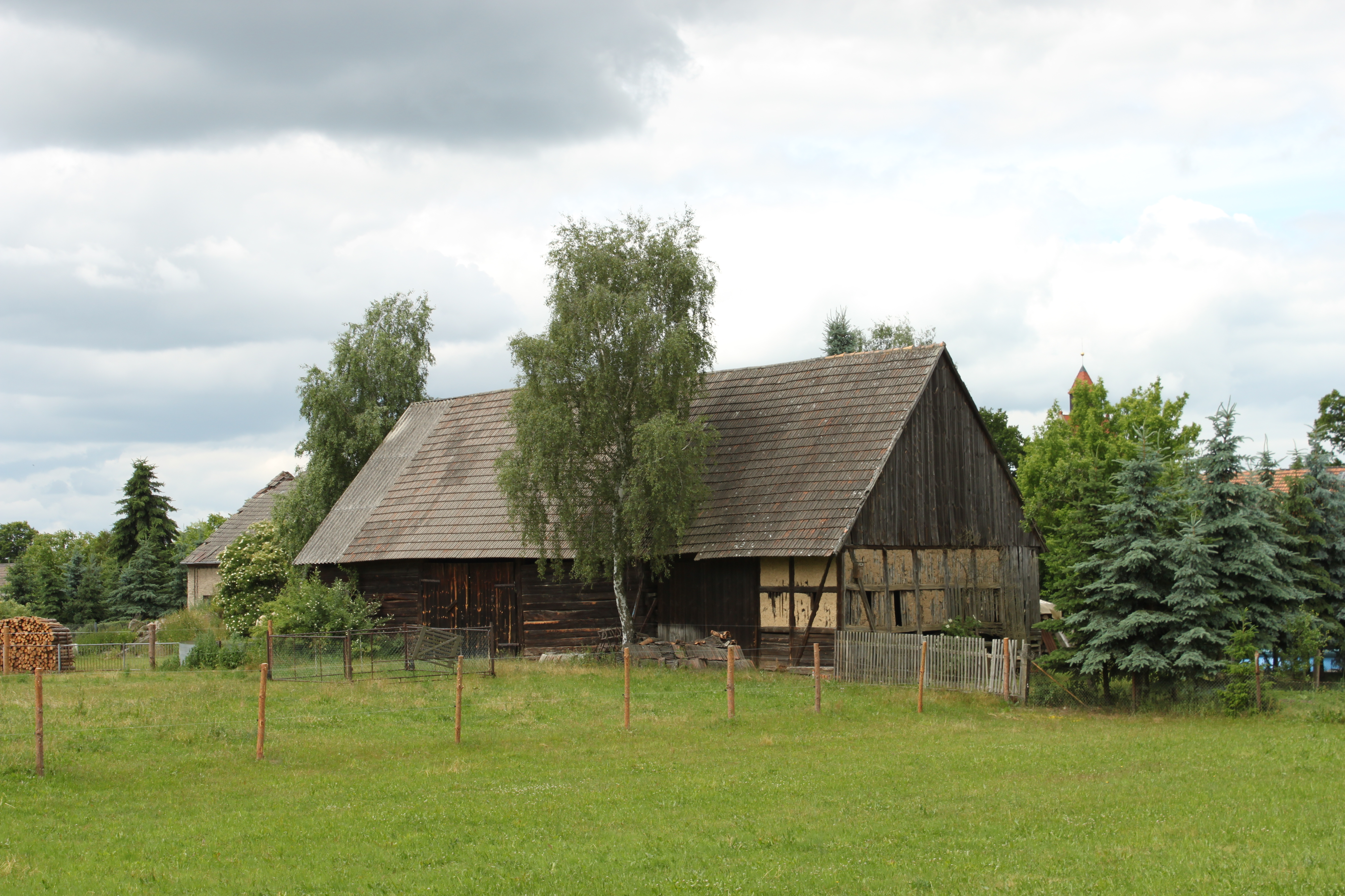 Scheune in Buchhain